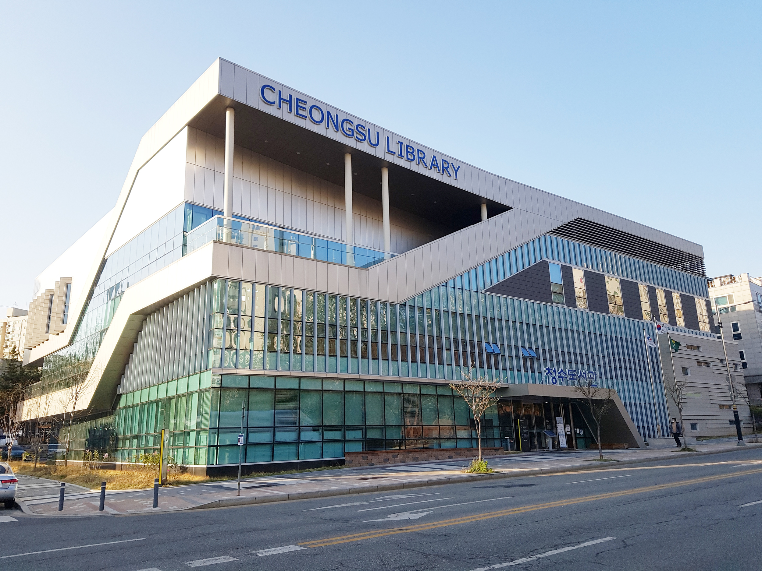 천안 청수도서관